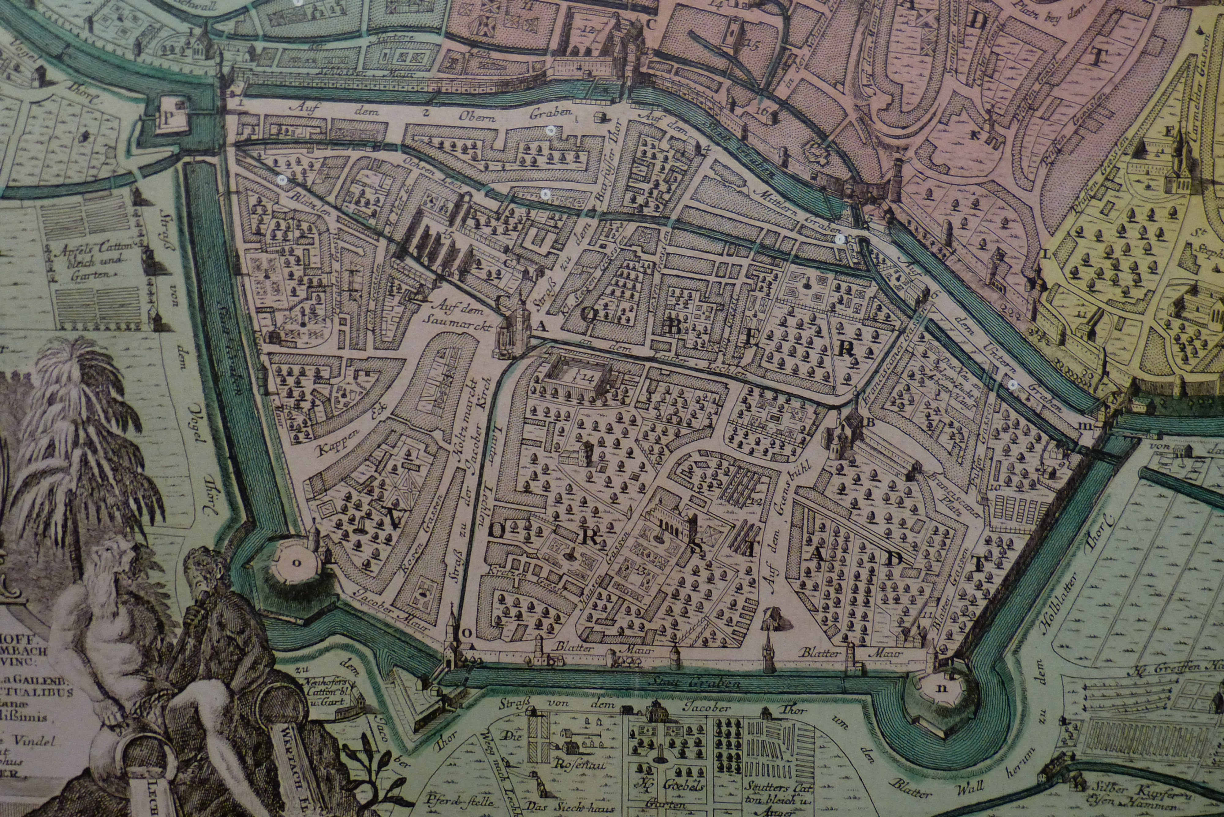 Ausschnitt von File:Augsburg-Karte Matthäus Seutter ca. 1730.jpg, der die Augsburger Jakobervorstadt zeigt.